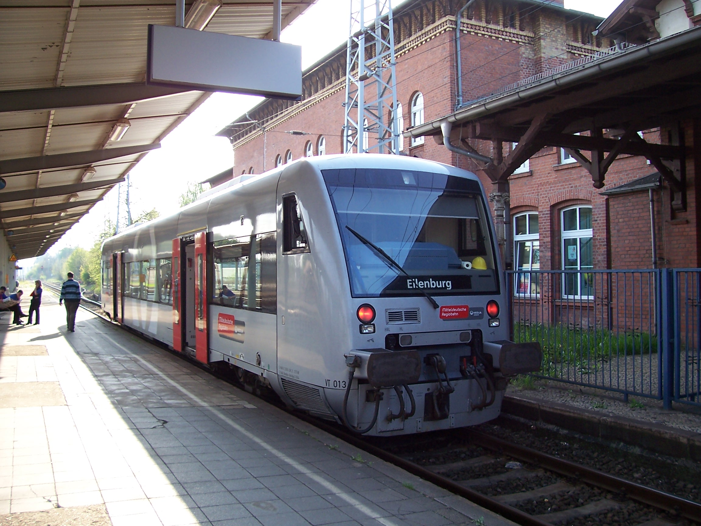 Mitteldeutsche Regiobahn (Stadler Regio-Shuttle RS1) am Gleis 1 des Bahnhofs Eilenburg